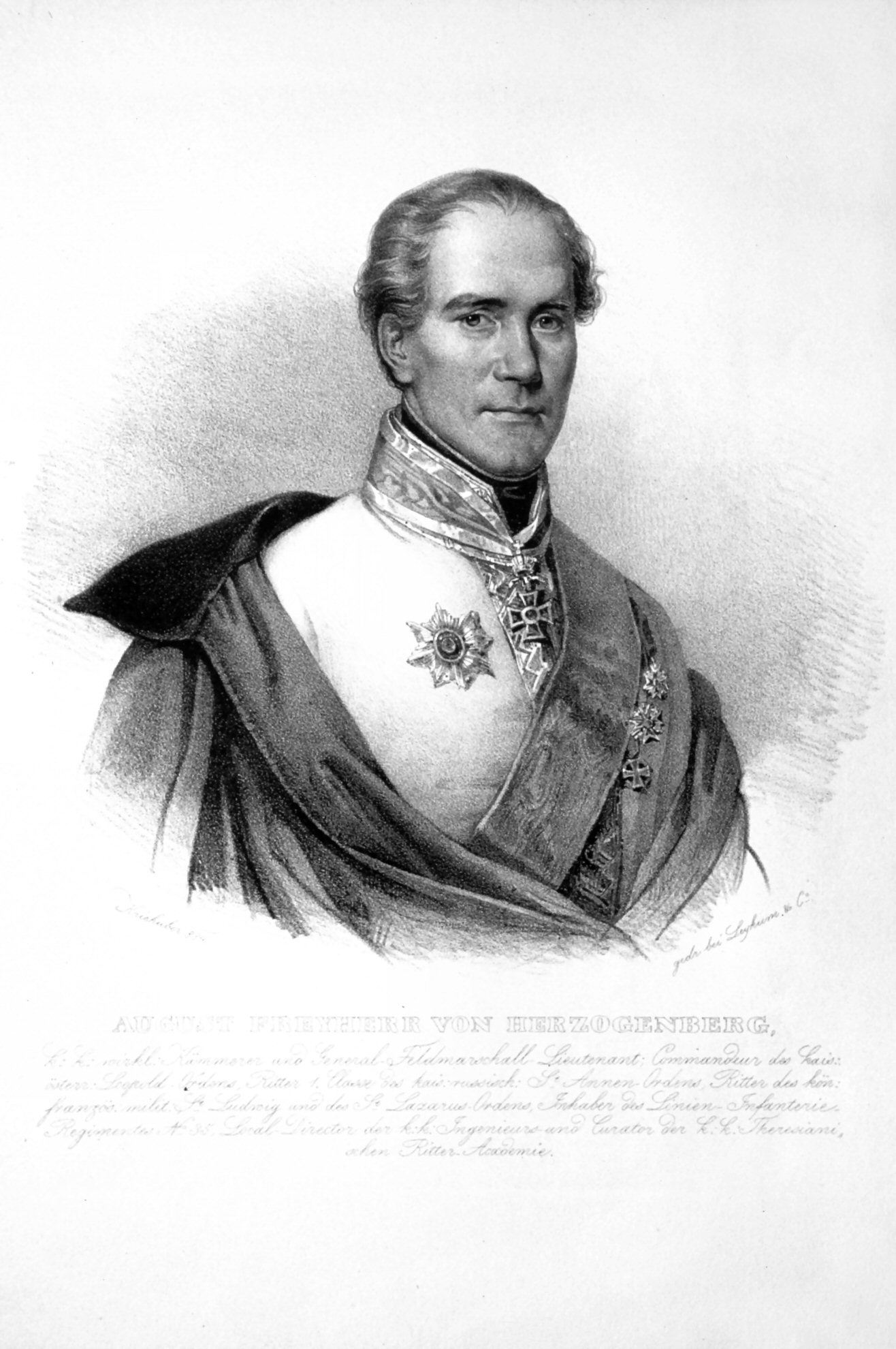 August Freiherr von Herzogenberg (1767-1834), k. k. Feldmarschalleutnant, Direktor der Militärakademie